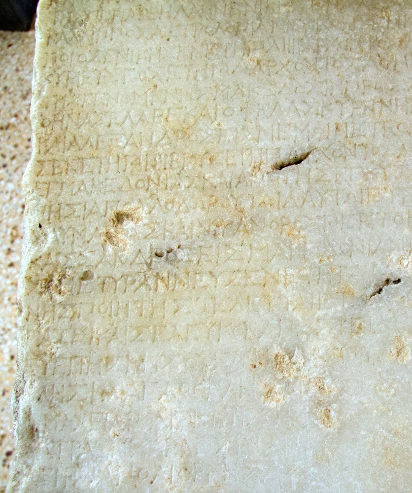 Frammento del Marmo Parium. Immagine già presente su Commons.